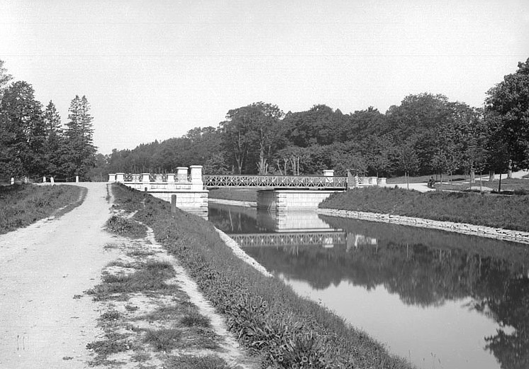 Djurgårdsbrunnsbron